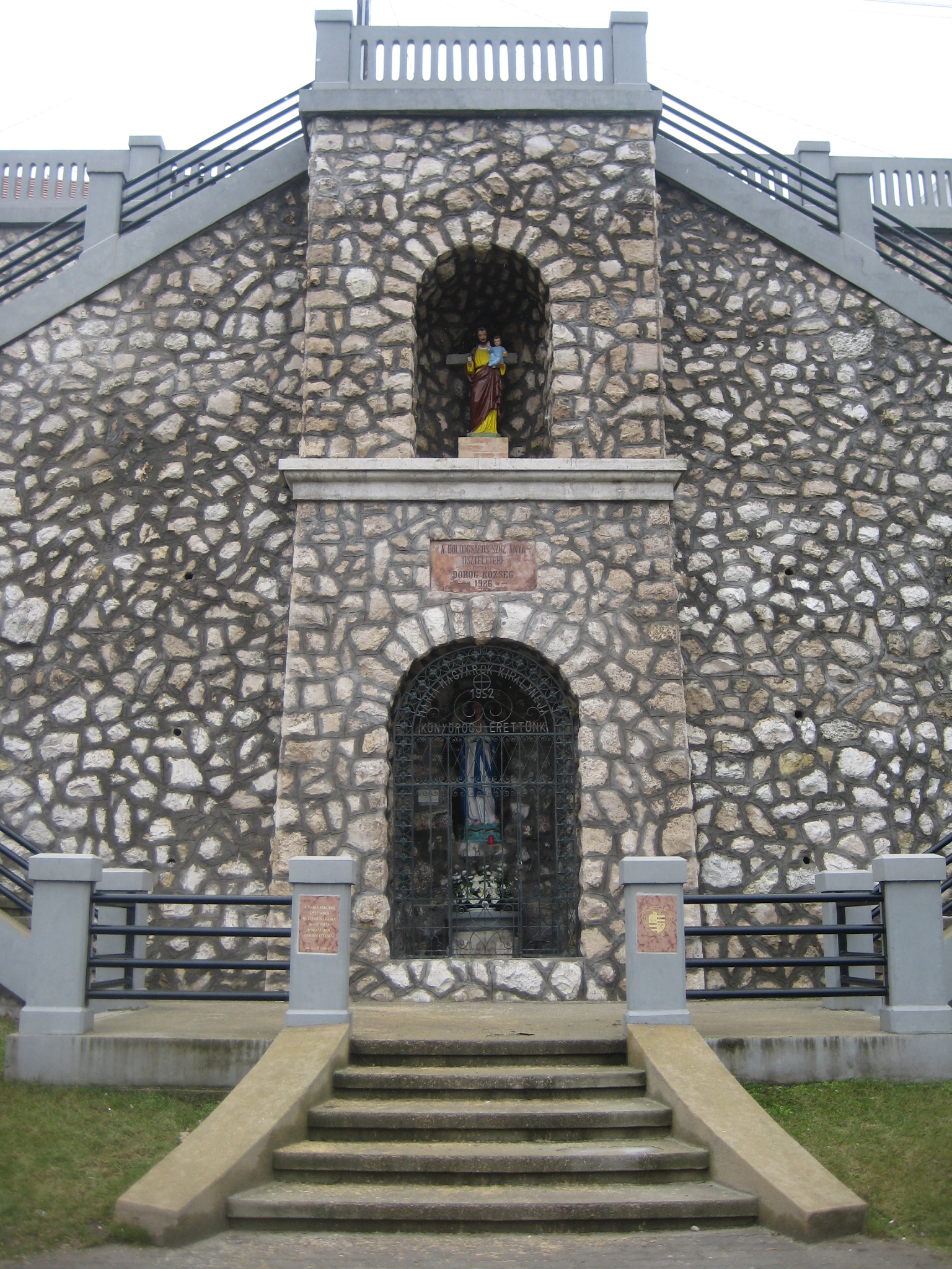 A dorogi Mária-barlang. kegyhely, támfal, barlang, szobor - azonosító -9478 Ady Endre utca